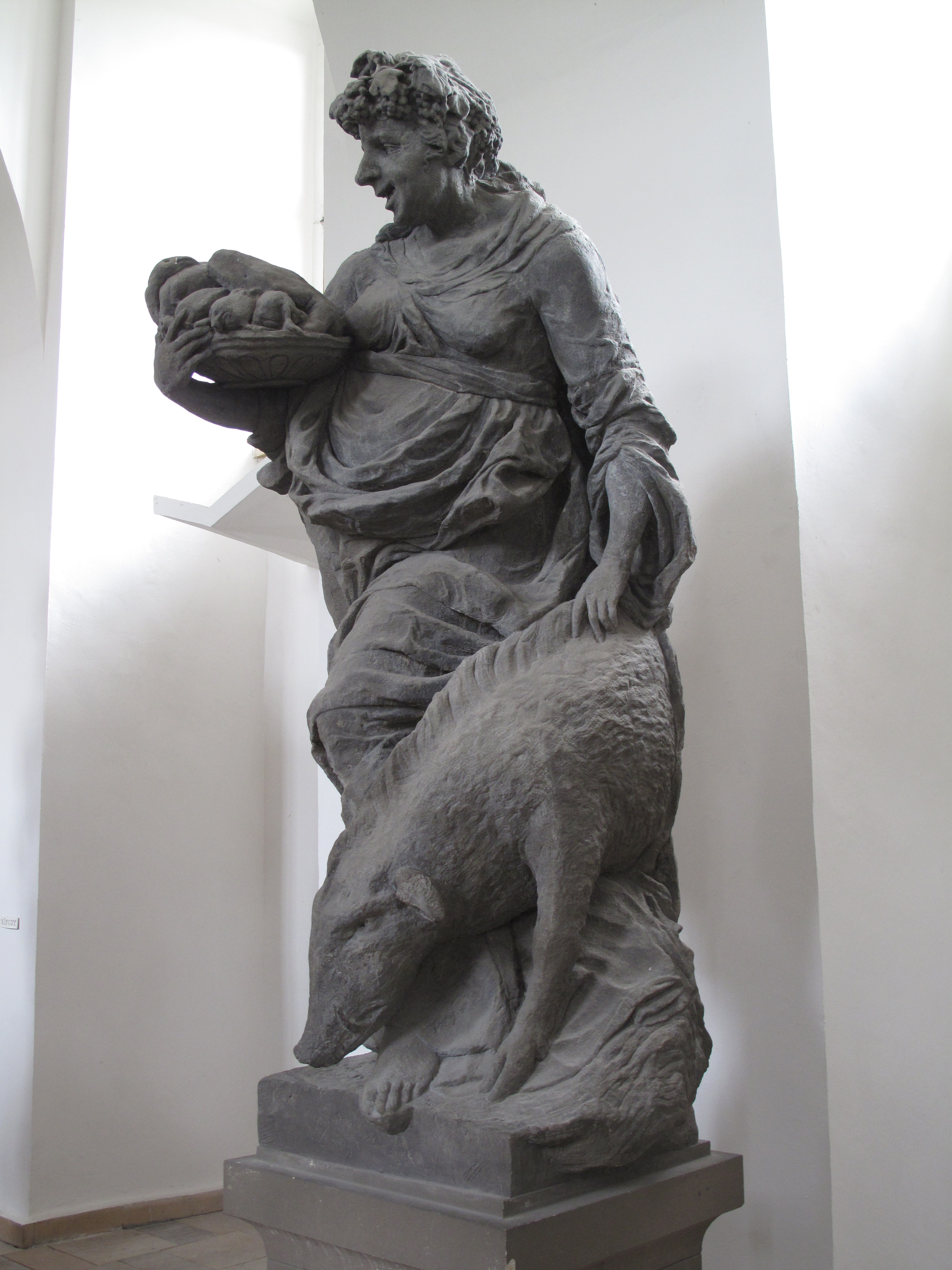 Matyáš Bernard Braun, Obžerství (Neřesti) - originál lapidárium Kuks